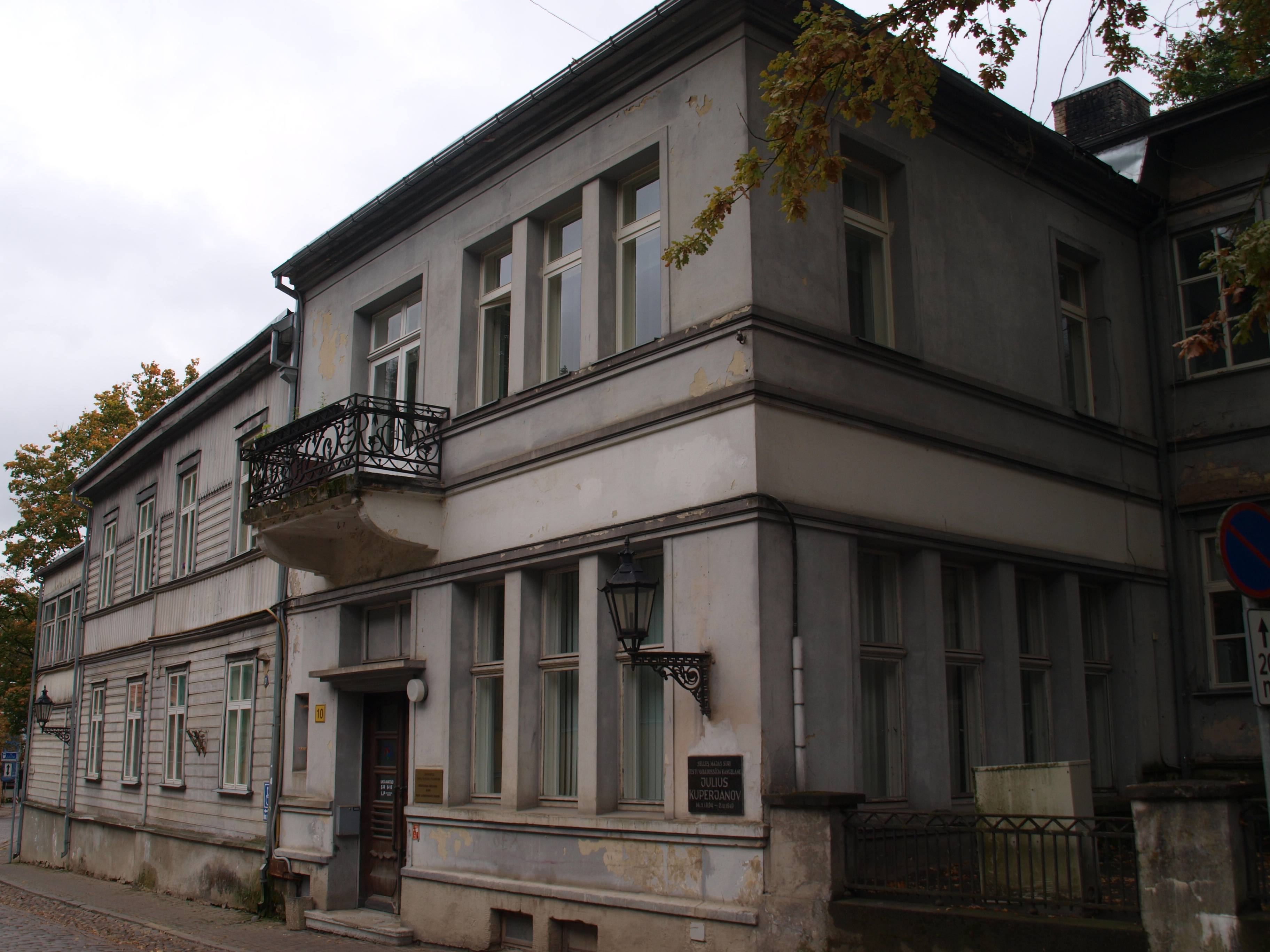 Elamu (kliinikuhoone)Tartus Vallikraavi 10/12, 19-20.saj.